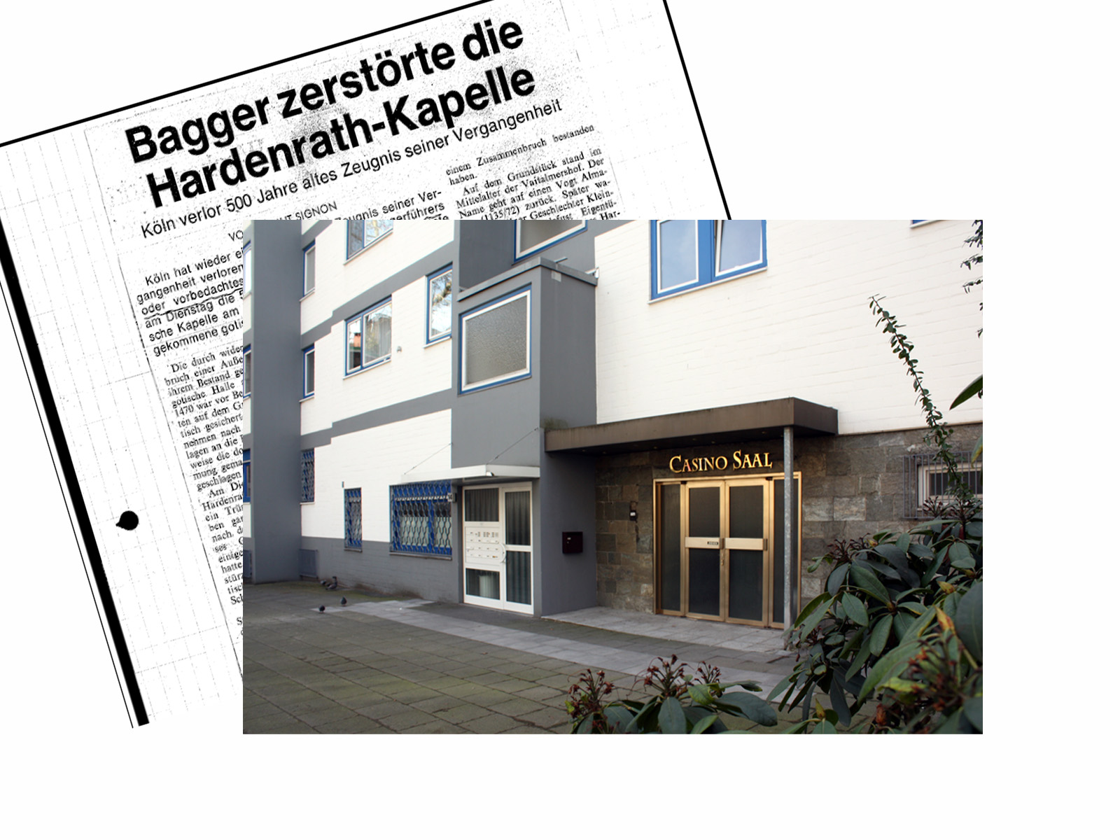 Köln, Marienplatz 14 - 16